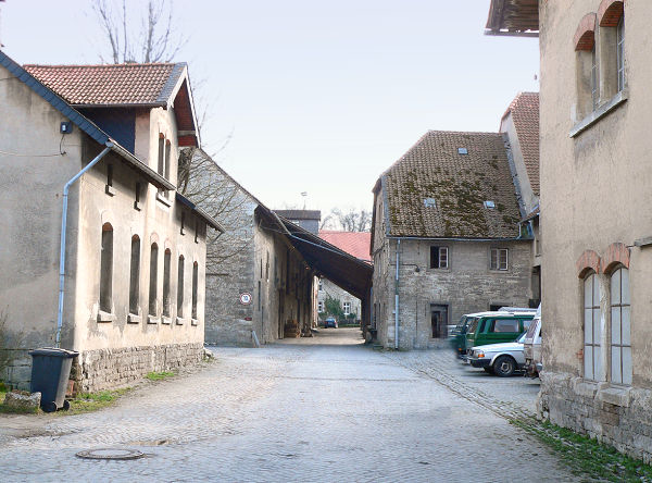 Gutshof Lucklum, von der Straße aus aufgenomen.